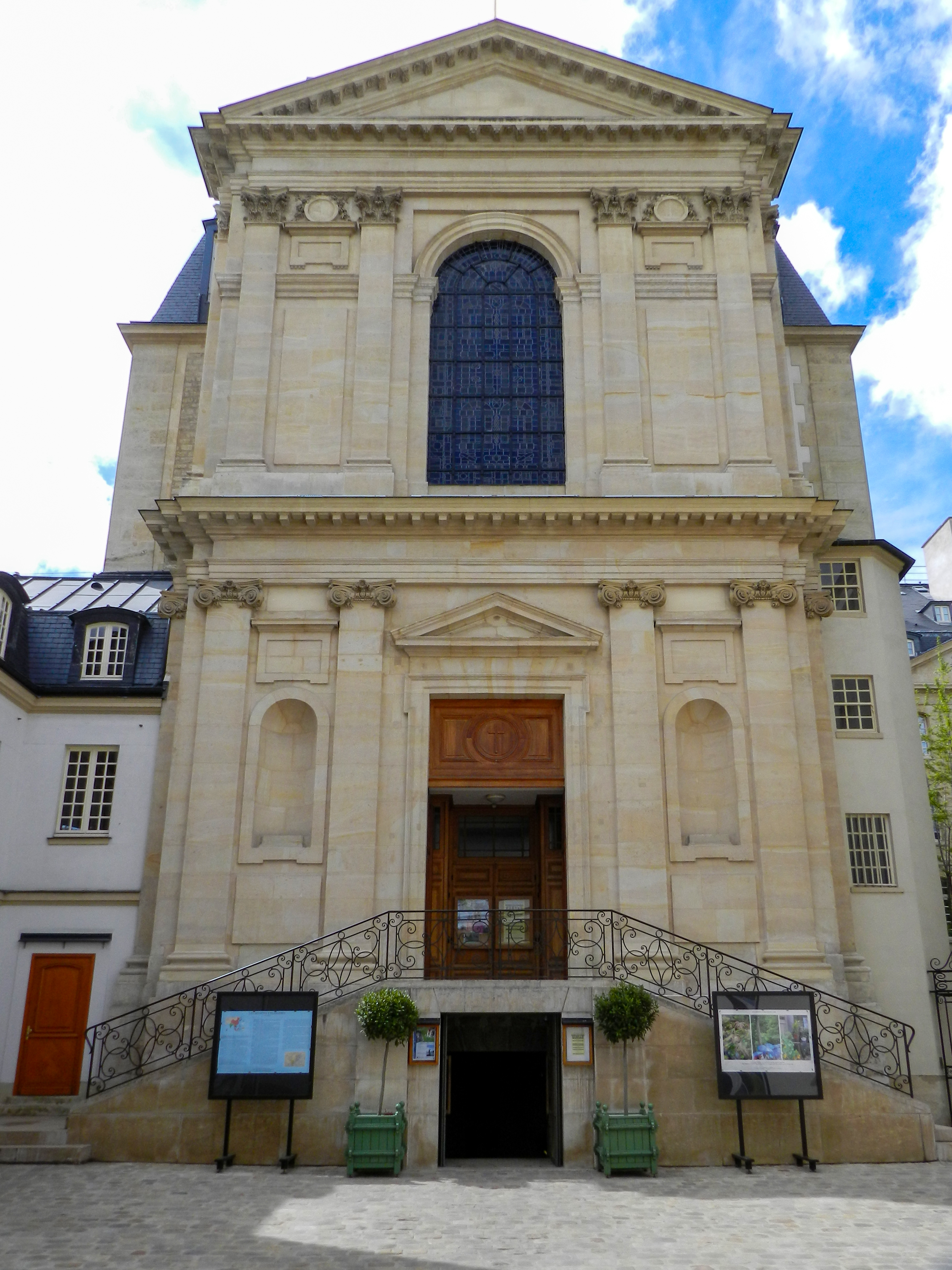 Chapelle de l'Épiphanie